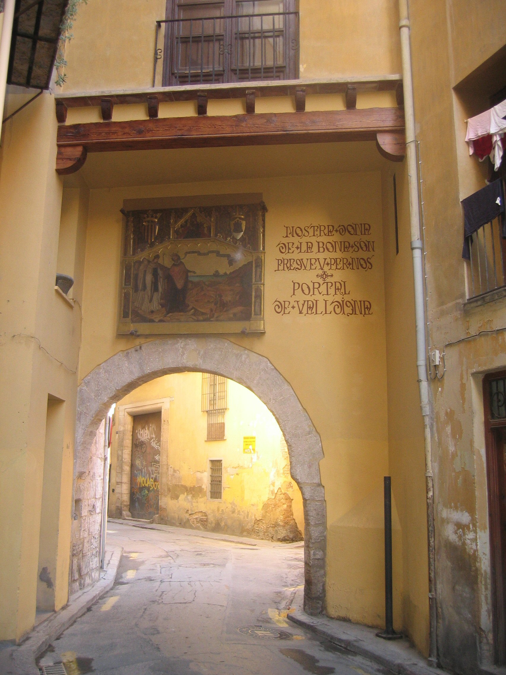 Portal realitzat a la muralla àrab i que permetia a l'accés al barri musulmà. Al costat seu es va imprimir el primer llibre a Espanya.